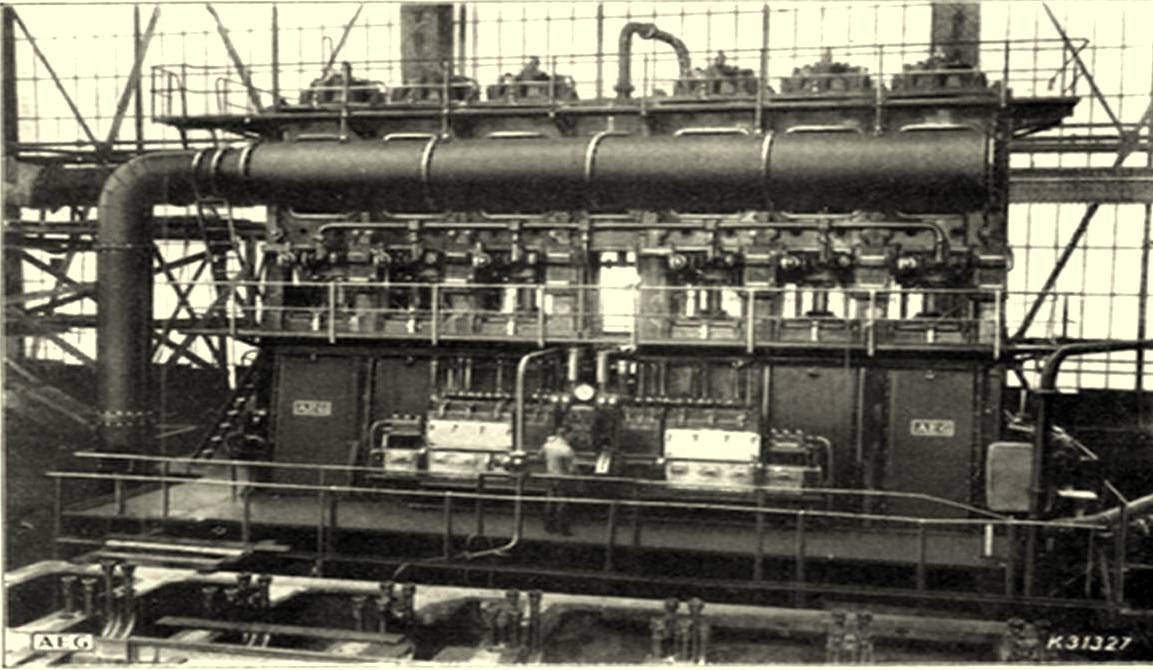 Foto des doppeltwirkenden AEG-2T-Dieselmotors mit Druckeinspritzung